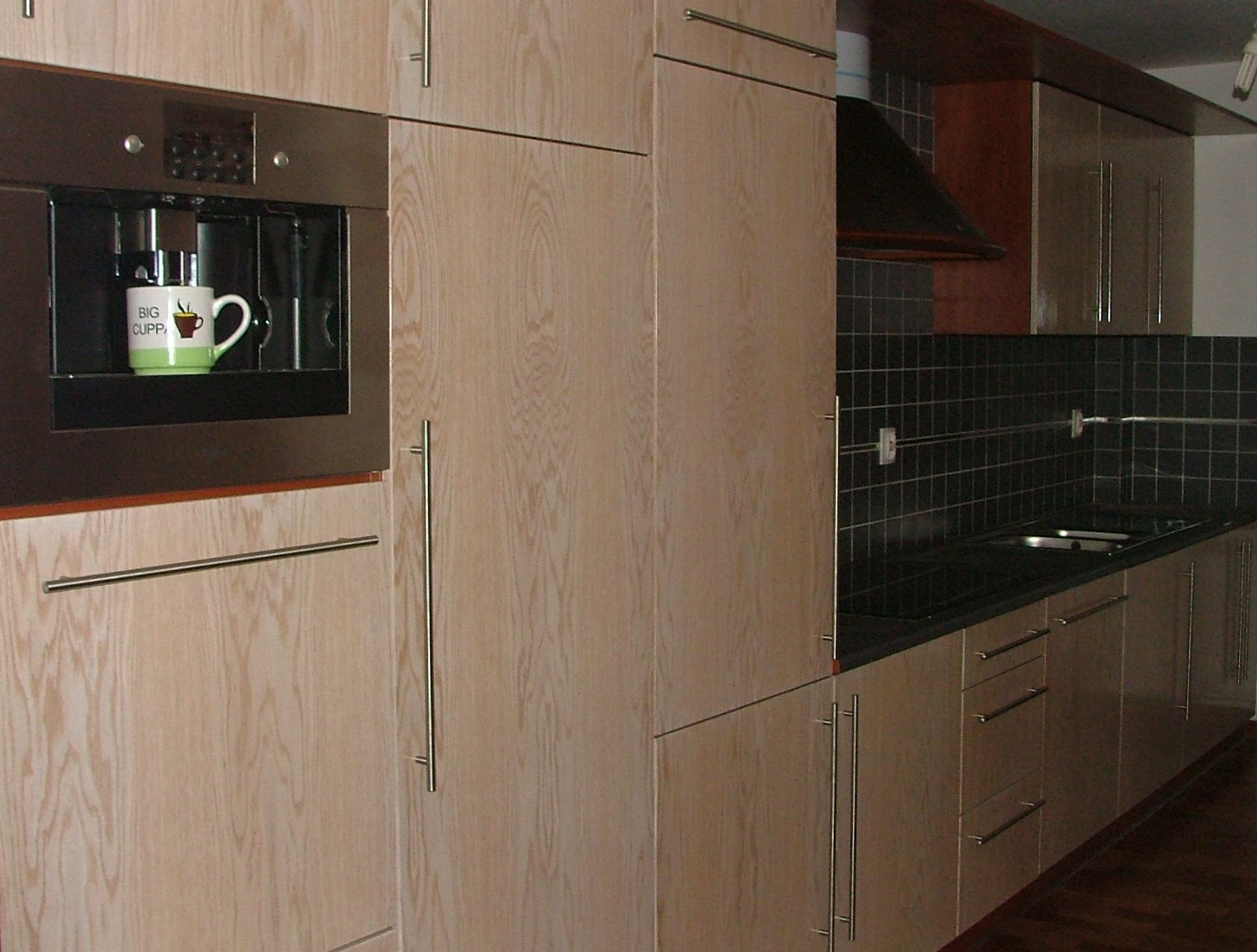 Kitchen